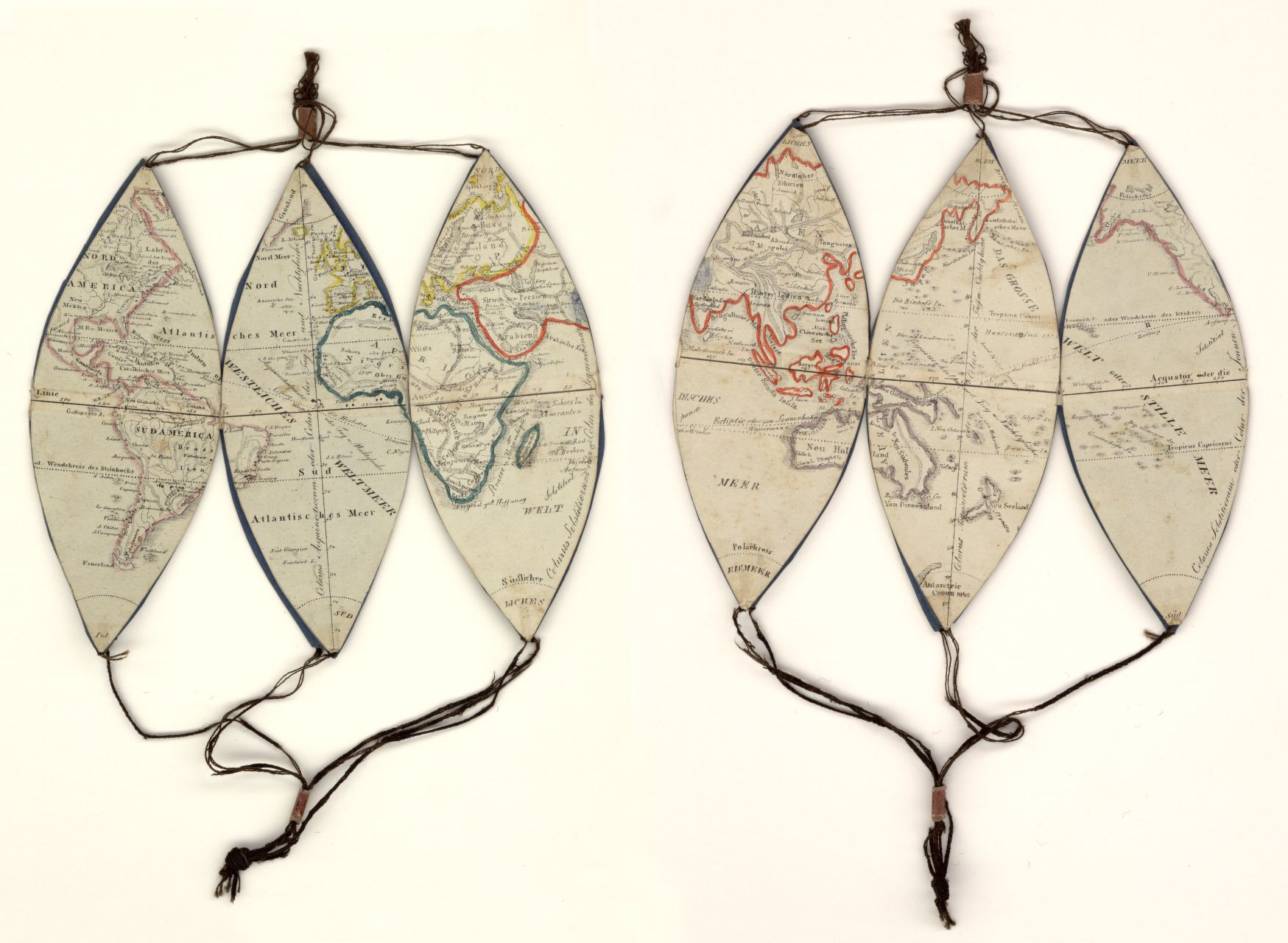 Joseph Franz Kaiser (1786-1859) erschuf diesen sechsteiligen Atlas, um die Projektion auf einer Kugel vorzunehmen. ID ind Permalink bei der Library of Congress